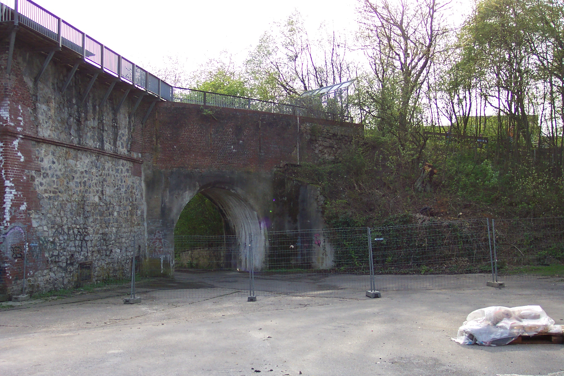 Der Eulenkopfweg, Wuppertal